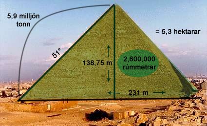 Pýramídinn í Giza og alls kyns mál varðandi hann.